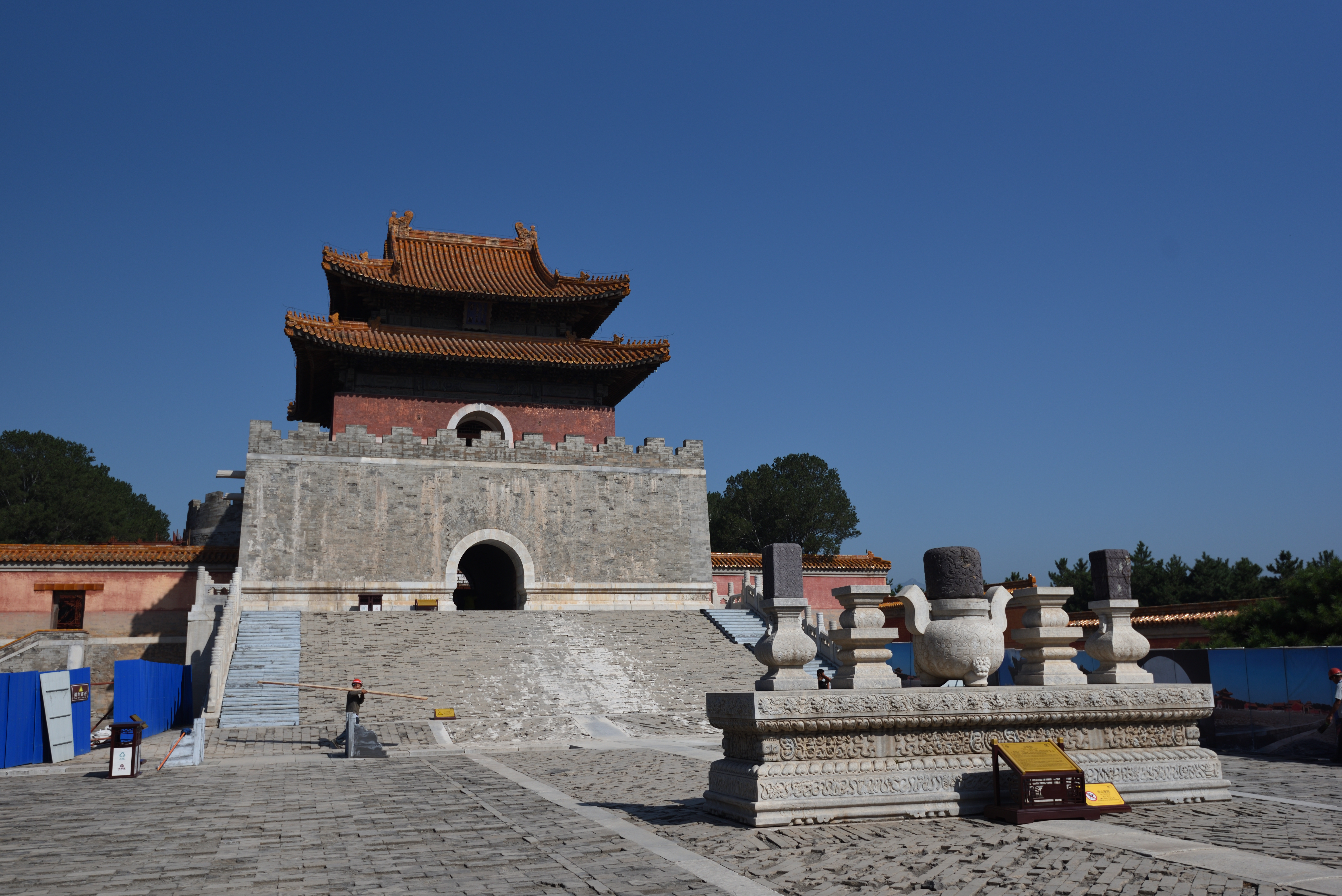 清崇陵（光绪帝墓）